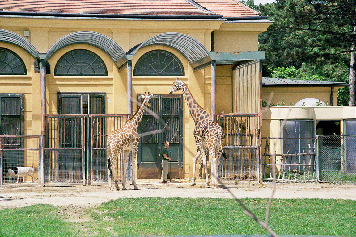 Giraffa camelopardalis in the Tiergarten Schönbrunn (Schloss Schönbrunn, Vienna)